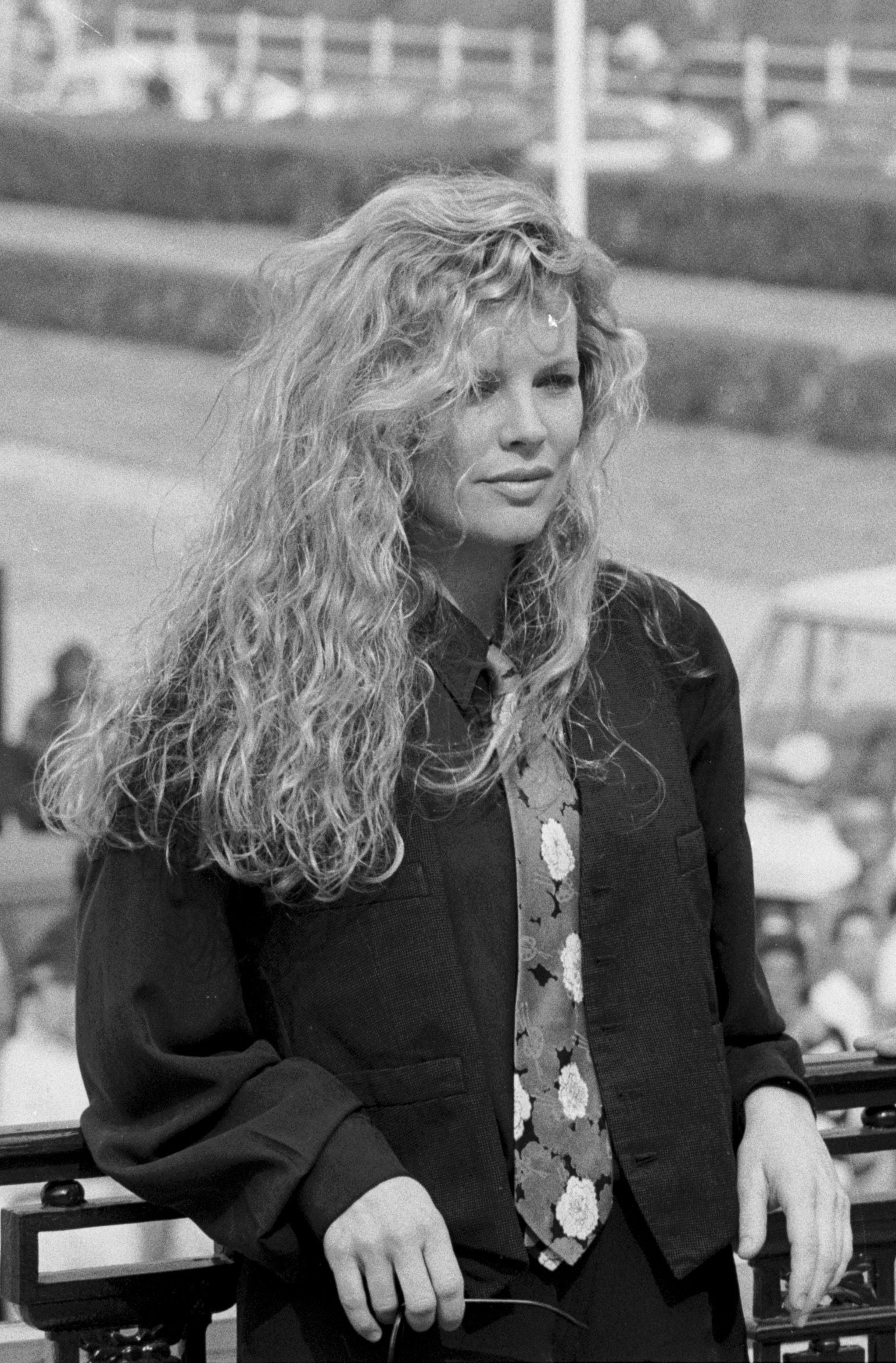 L'actrice américaine Kim Basinger au Festival du cinéma américain à Deauville (Basse-Normandie, France).